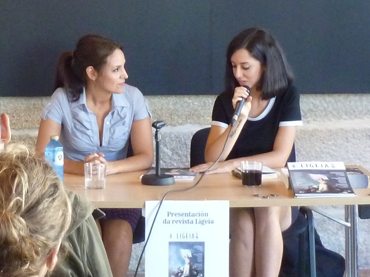 Iria Collazo e Tamara Andrés presentando a revista Ligeia en Bueu o 22/09/2018